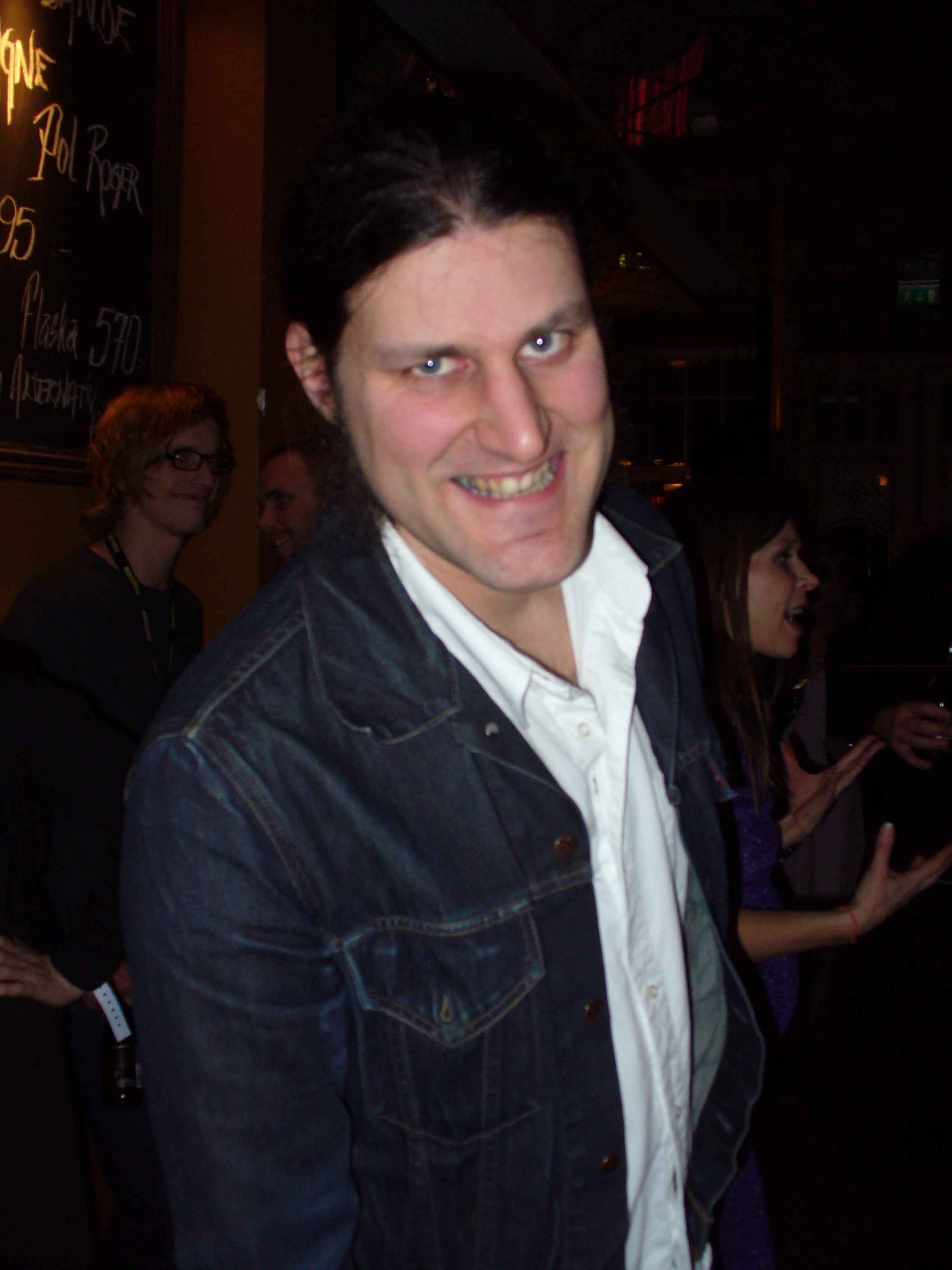 Orvar Säfström at Aftonbladet TV Awards, 2007